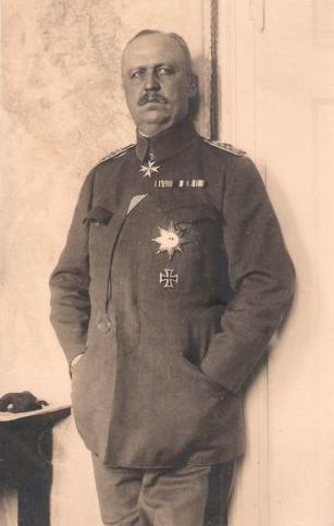 Erich Ludendorff auf einer alten Postkarte, wahrscheinlich im Hauptquartier der 8. Armee oder im Hauptquartier der OHL ca 1915 -1917